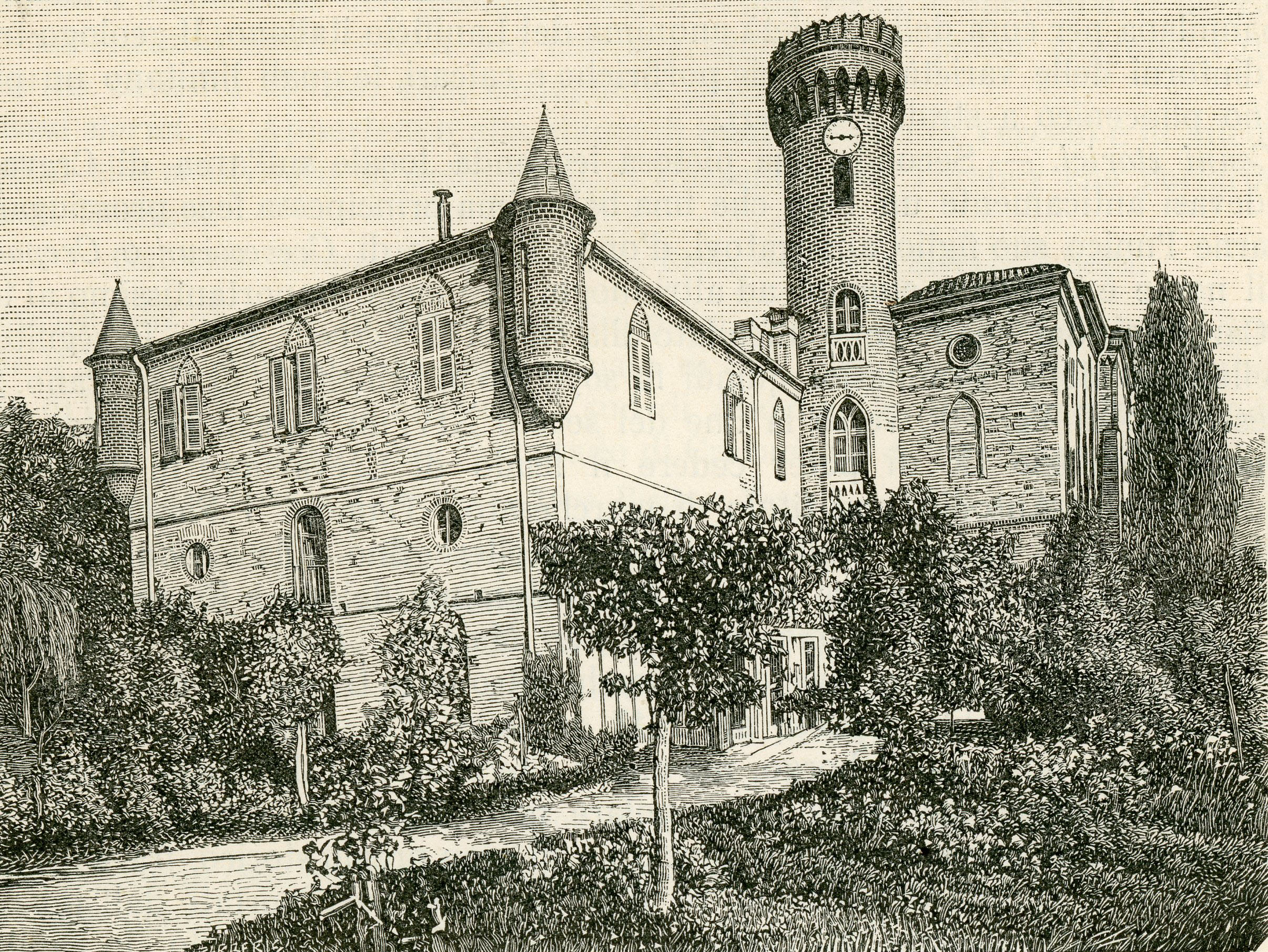 Castello di Vigliano Biellese, (xilografia di Barberis).